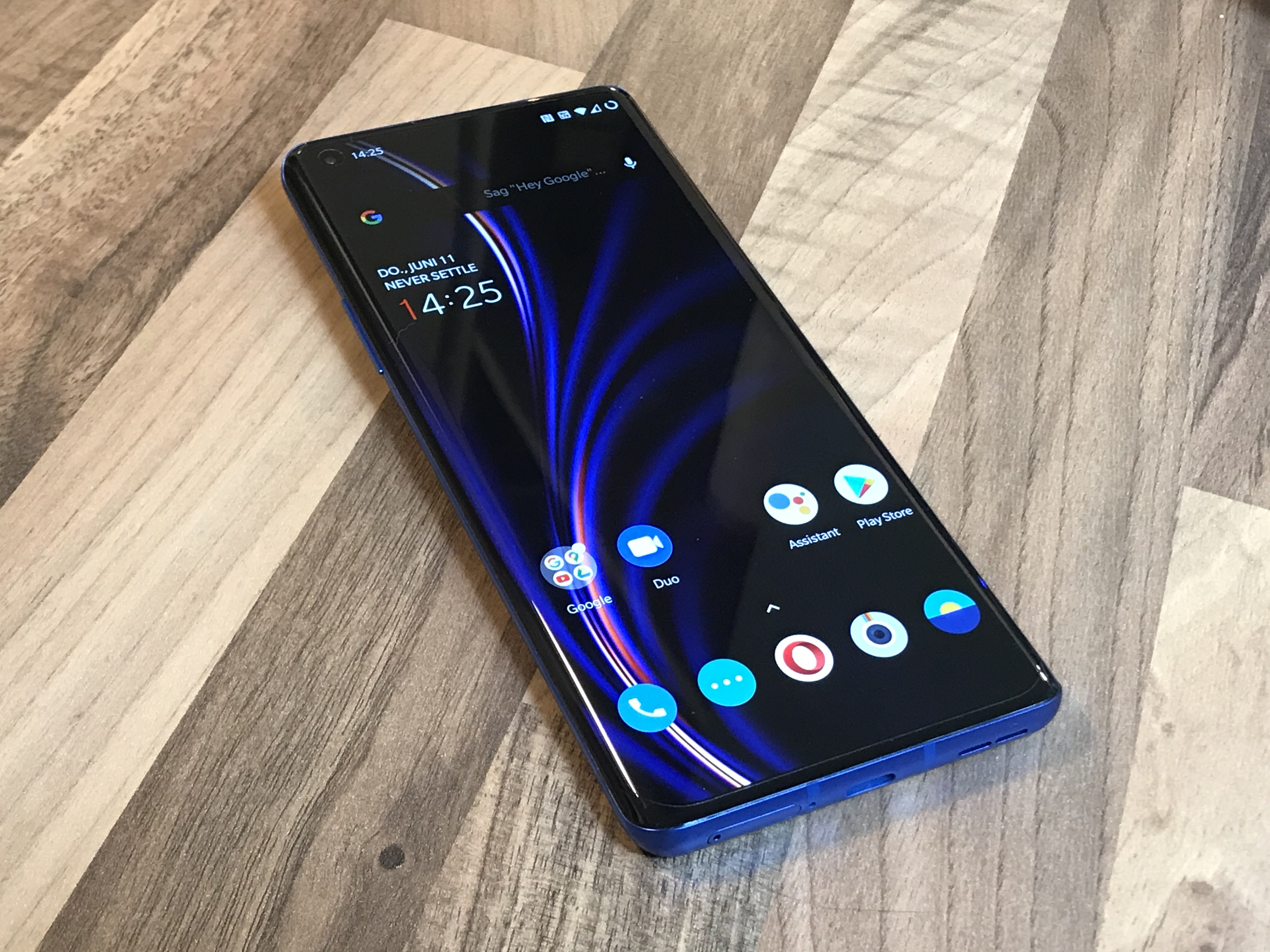 OnePlus 8 Pro (Ultramarine Blue)